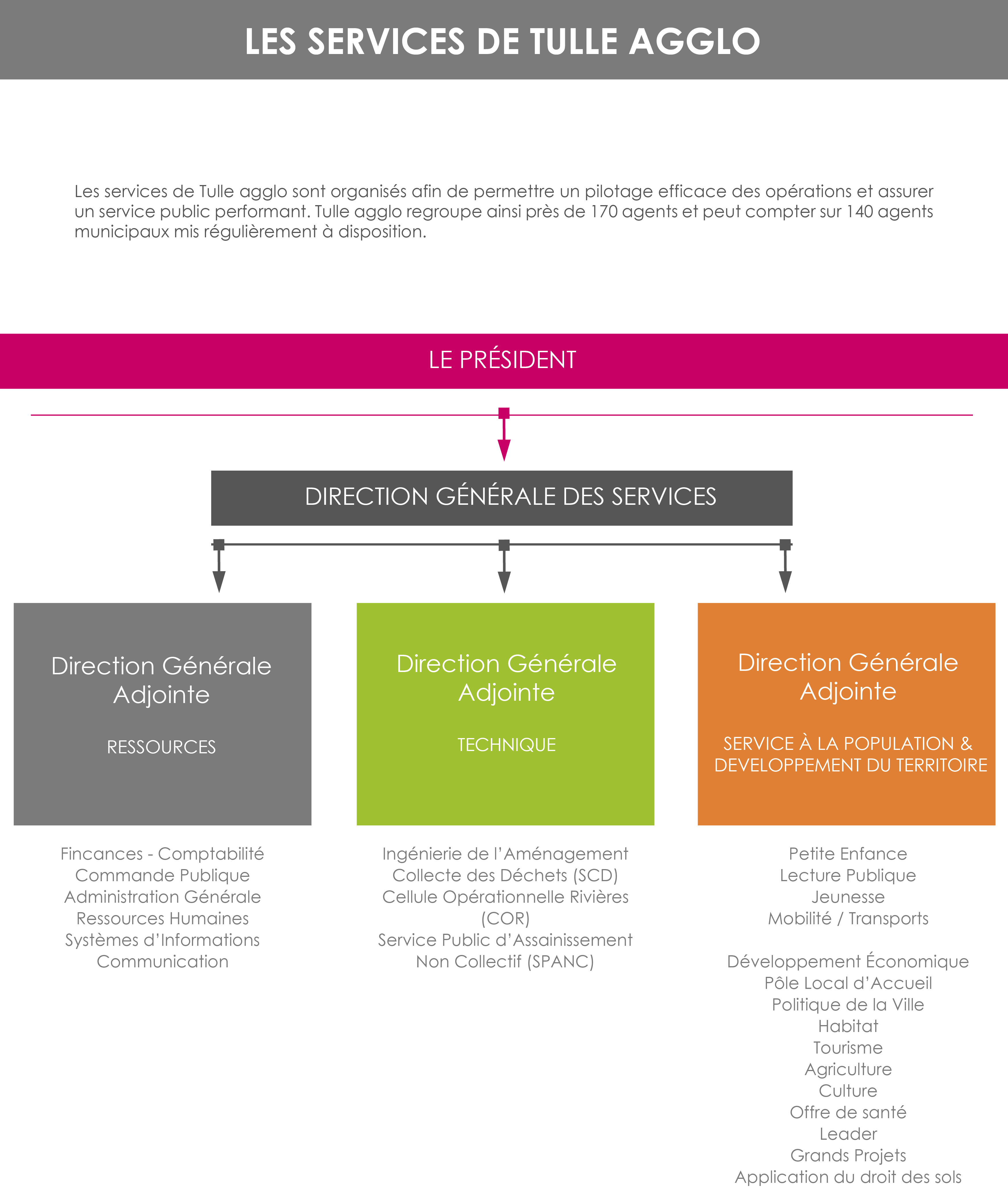 Schéma sur l'organisation des services de Tulle Agglo